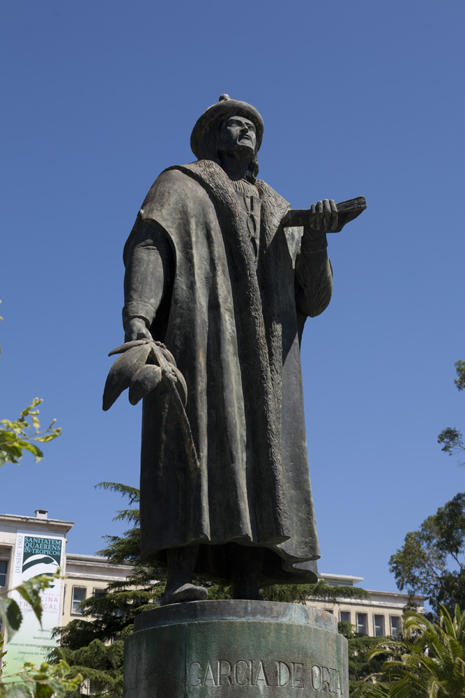 Martins Correia, Monumento a Garcia de Orta, Instituto de Medicina Tropical, Lisboa